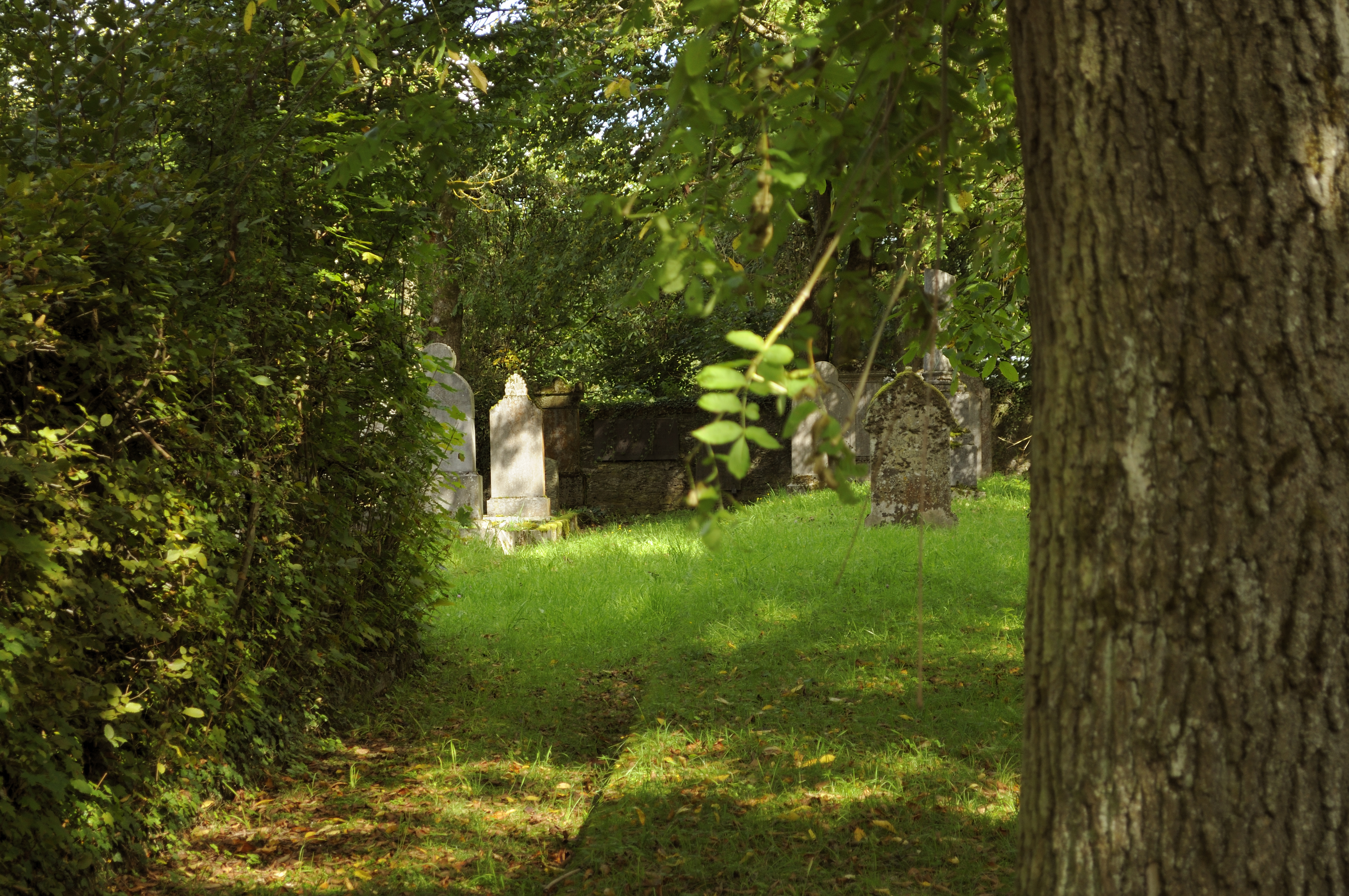 Dieses Foto entstand im Rahmen des Projekts Wiki Loves Monuments Mittelhessen, das aus dem Community-Projektbudget von Wikimedia Deutschland e. V. gefördert wurde.